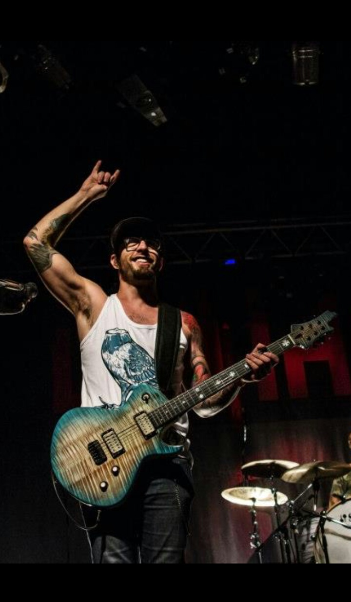 Tery Langer con su guitarra Valoy. Recital de Carajo en la gira reedición Carajo-Carajo.